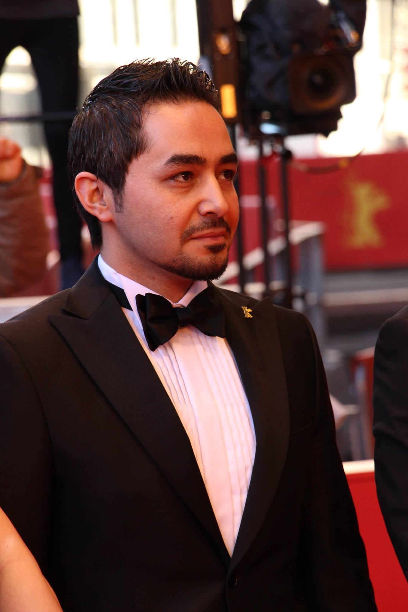 الممثل شيروان حاجي في مهرجان برلين السنمائي الدولي (البرليناله)